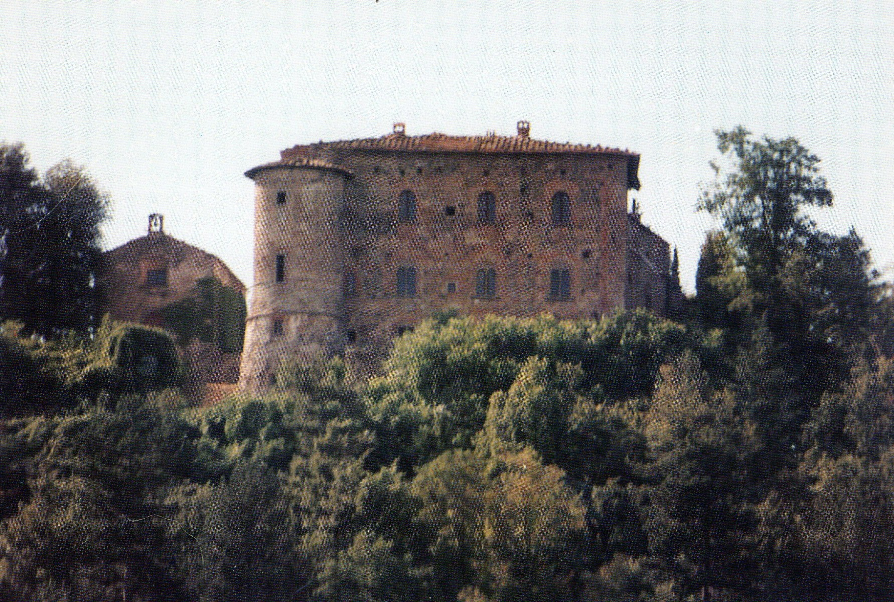 Descrizione = Veduta del Castello di Montauto (Anghiari-AR) - Fonte = ho fatto la foto all'immagine - Data = 10-05-2013 - Autore = Darja82 - Licenza = qui sotto - Copyright = qui sotto